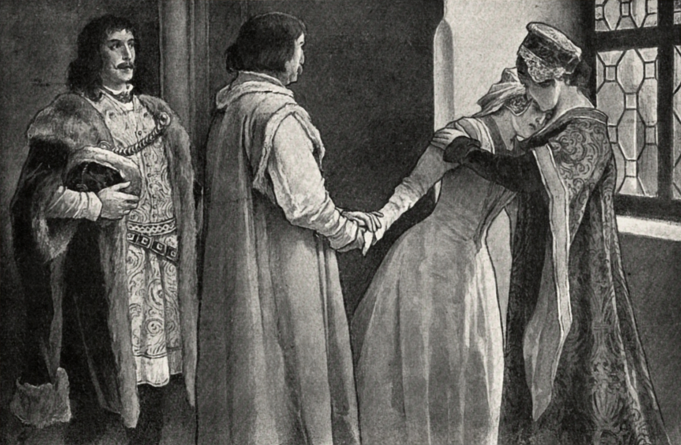 Věnceslav Černý - Odchod Kateřiny, dcery Jiříkovy, z domova do Uher